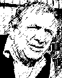 Miroslav Houra